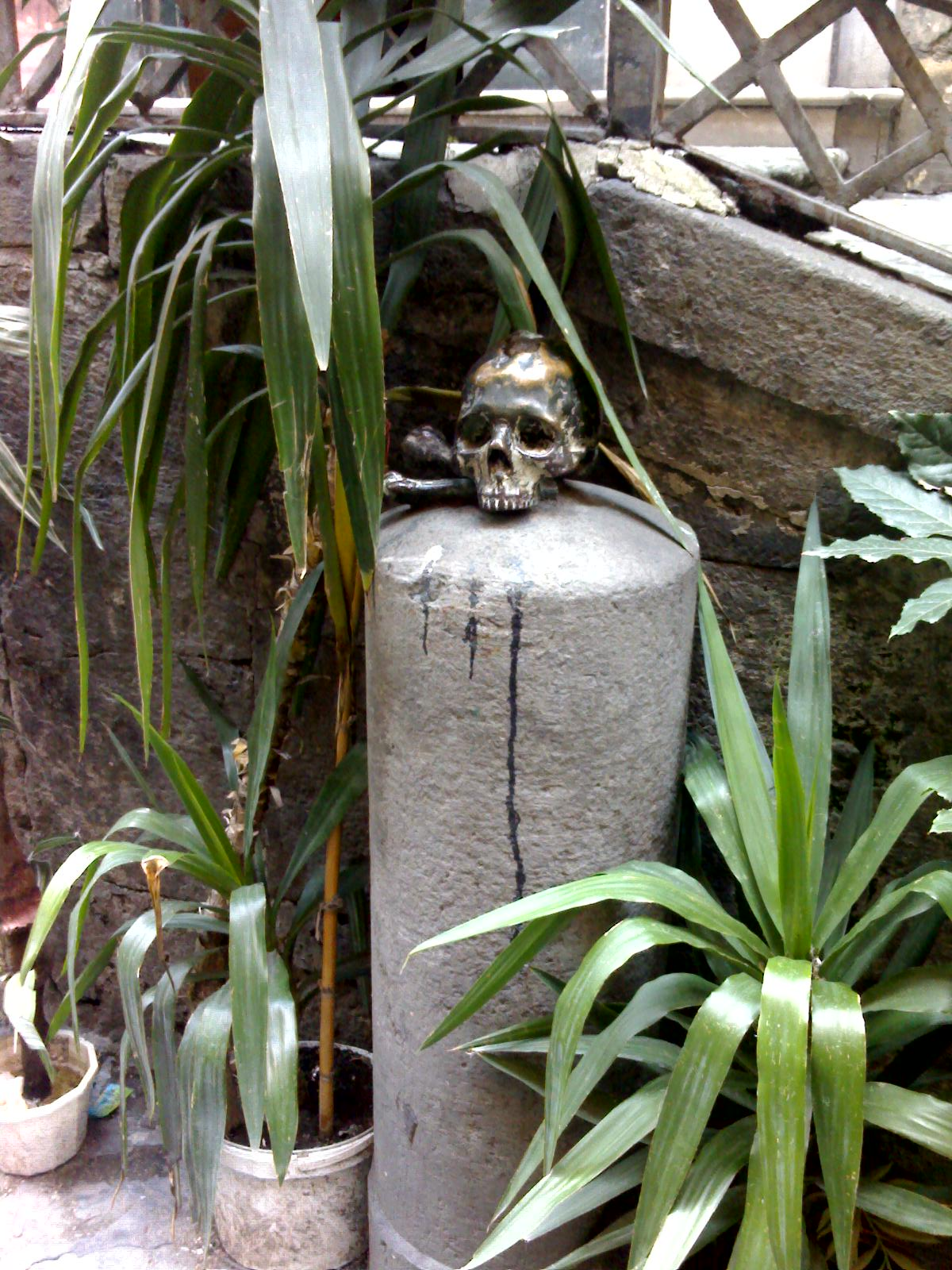 Uno dei due teschi posti all'esterno della Chiesa del Purgatorio ad Arco (Napoli)